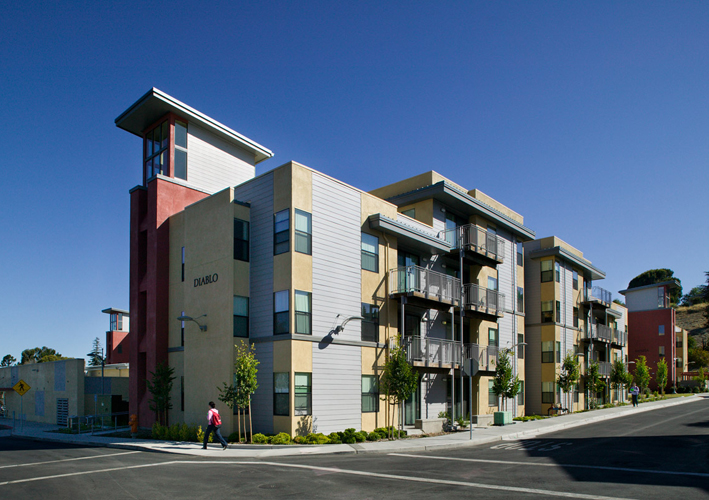 DORM